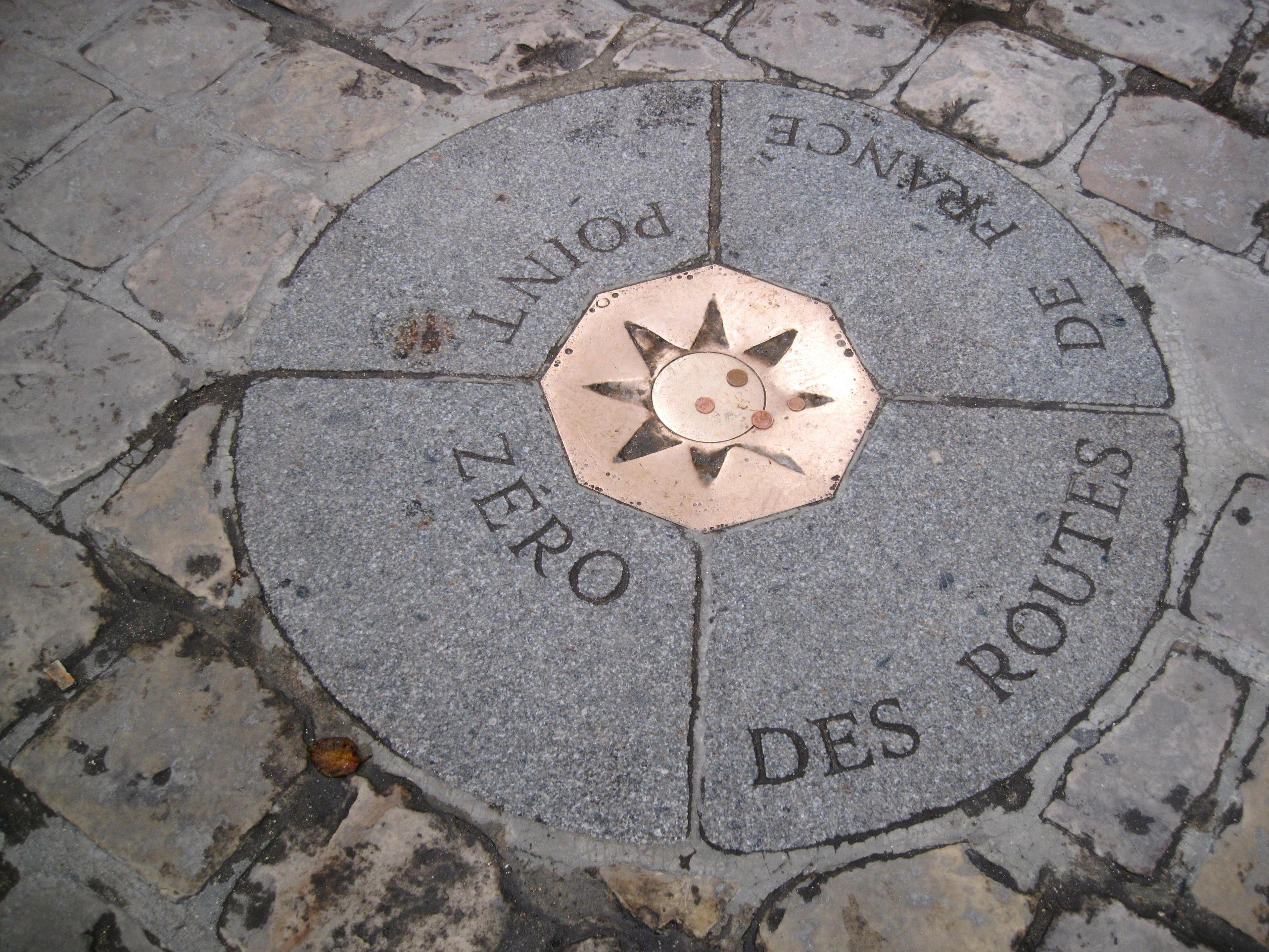 Point Zéro (plus précisément le Point Kilomètre Zéro) des Routes de France est matérialisé par une dalle en quatre quartiers au centre de laquelle est placé un médaillon hexagonal représentant une rose des vents. C' est à partir de ce point que sont calculées, en kilomètres, les distances routières entre Paris et les autres villes de France. Ce Point Zéro est situé sur le parvis de Notre-Dame de Paris. Comme à la Fontaine de Trevi à Rome, certains touristes, probablement sans donner de sens précis à leur geste, lancent une pièce de quelques centimes d' Euro, dans le cas présent, sur le médaillon. Paris, France